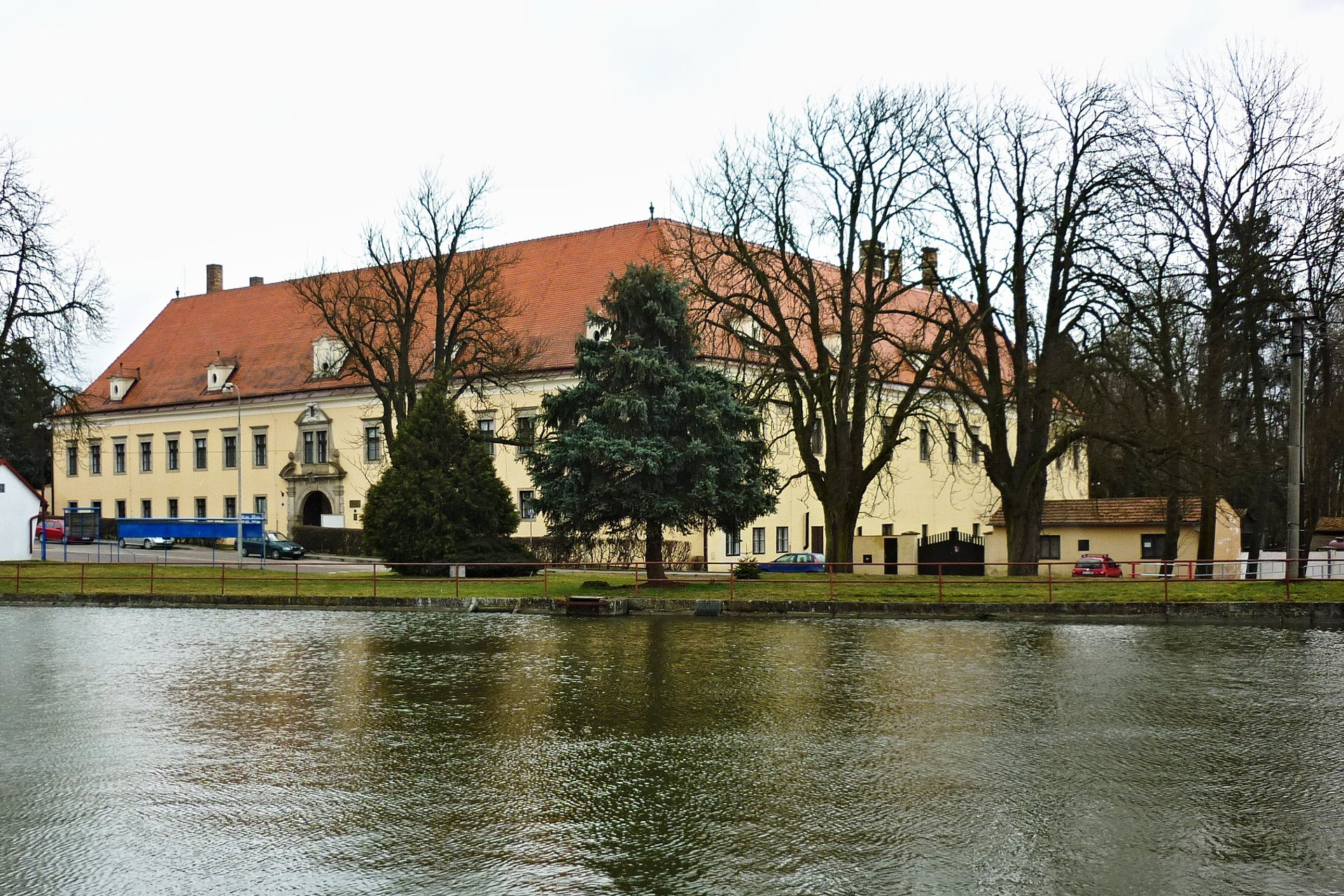 Budíškovice - zámek